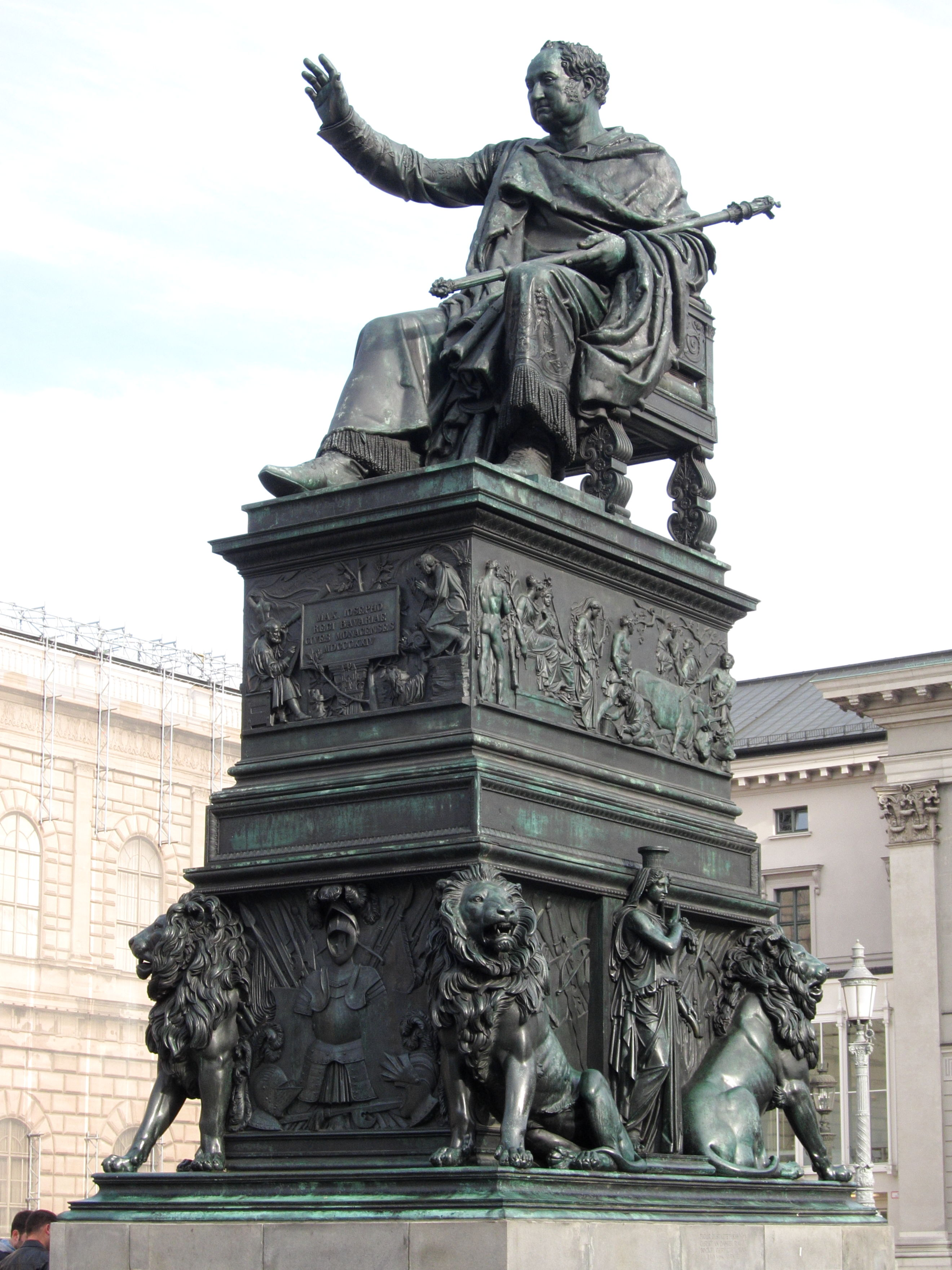 Max-Joseph-Platz; Denkmal König Max I. Joseph, enthüllt 1835, von Christian Daniel Rauch nach Entwurf von Leo von Klenze, gegossen von Johann Baptist Stiglmaier.